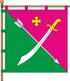 Прапор м. Мена